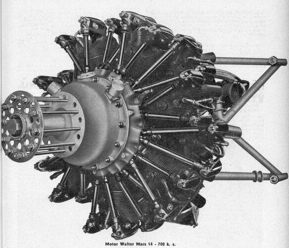 Walter Mars 14M (1937), vzduchem chlazený dvouhvězdicový čtrnáctiválcový letecký motor s kompresorem